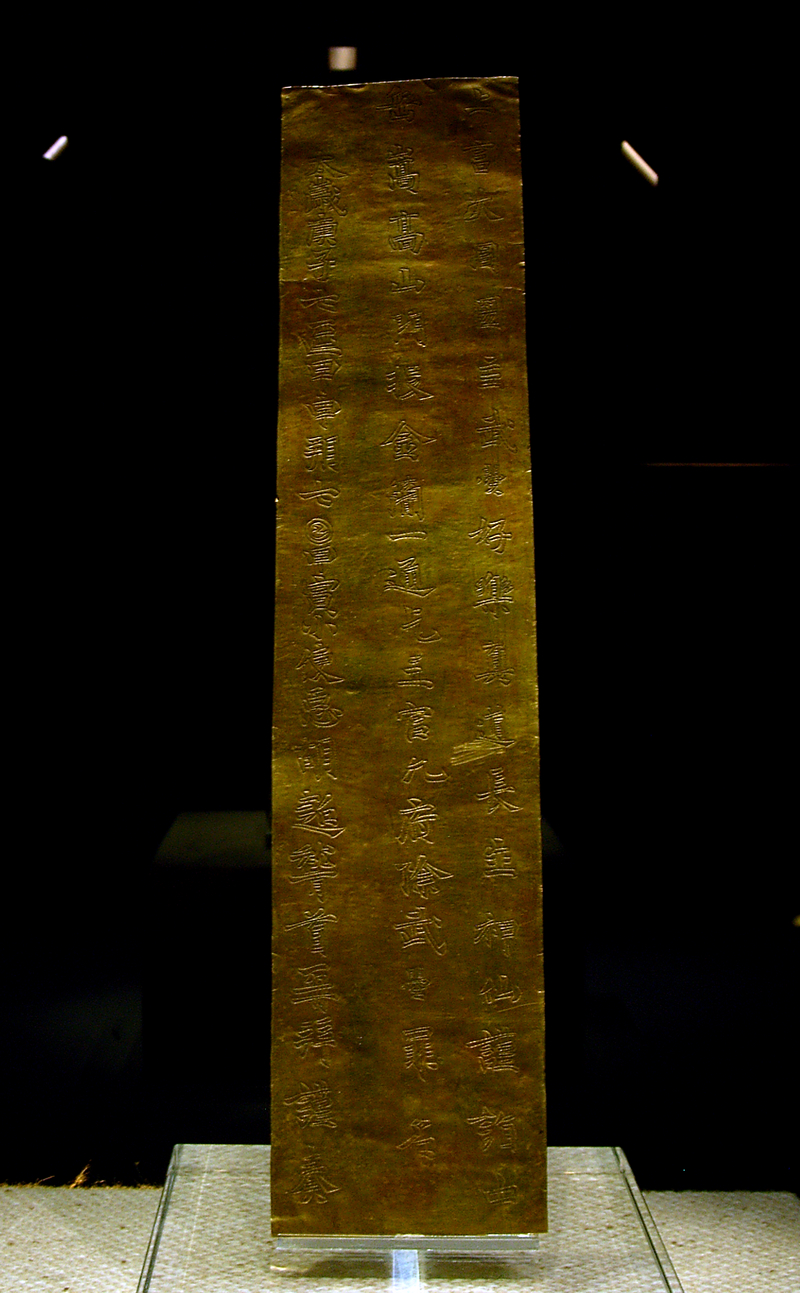 河南博物院 武瞾金简